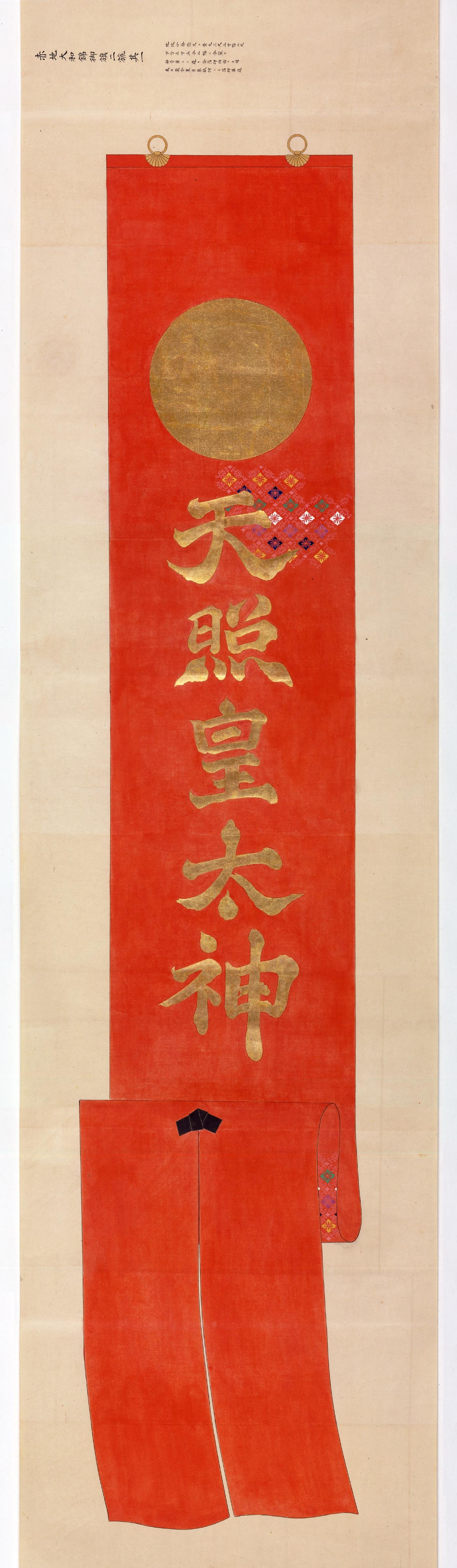 戊辰戦争の際に用いられた錦旗の図。